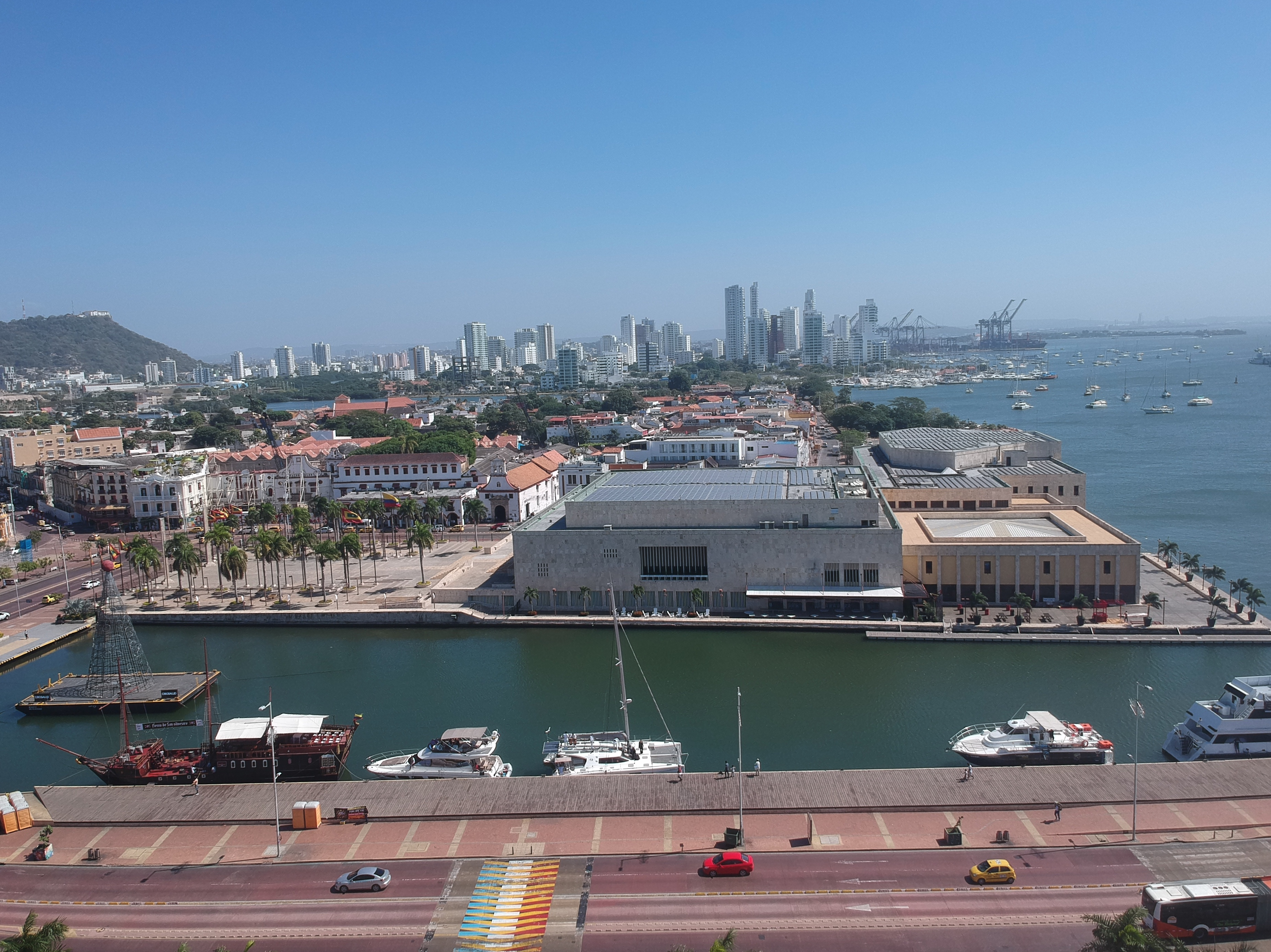 Centro de convenciones y barrio Manga